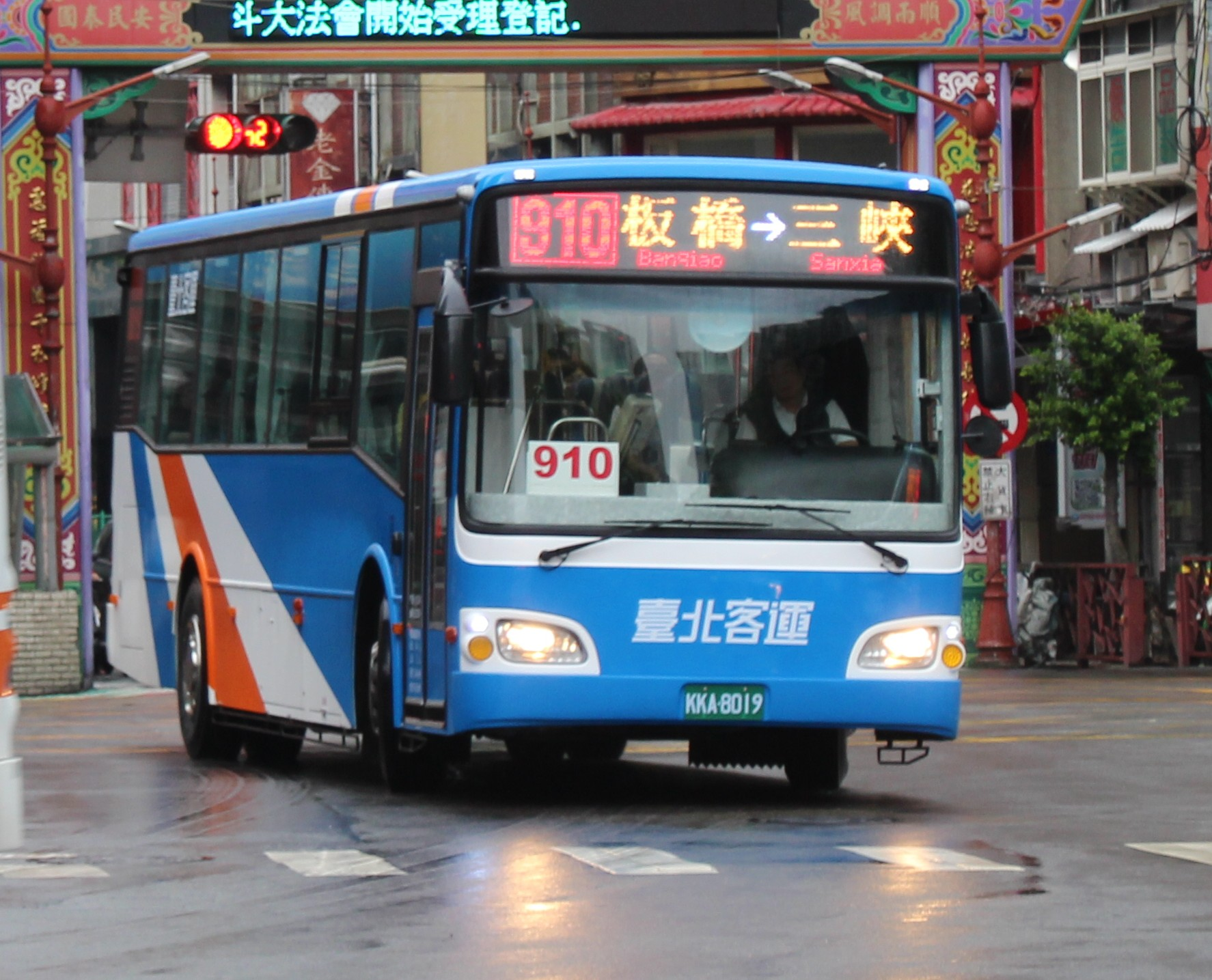 中文（台灣）: 台北客運2018年日野RK8JRVA-KJF大客車KKA-8019車門側 台北客運2018年新式塗裝車輛 行駛910線